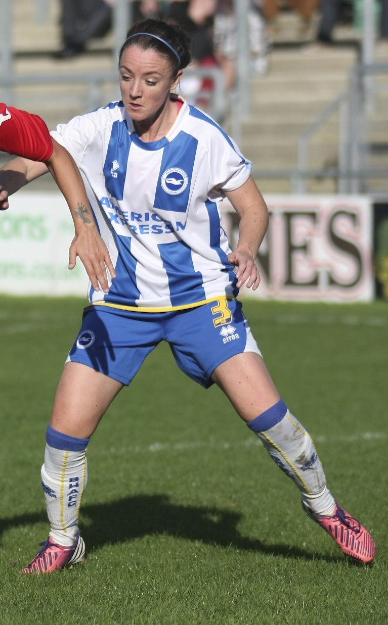 Lewes Ladies v BHA 5 10 13 426